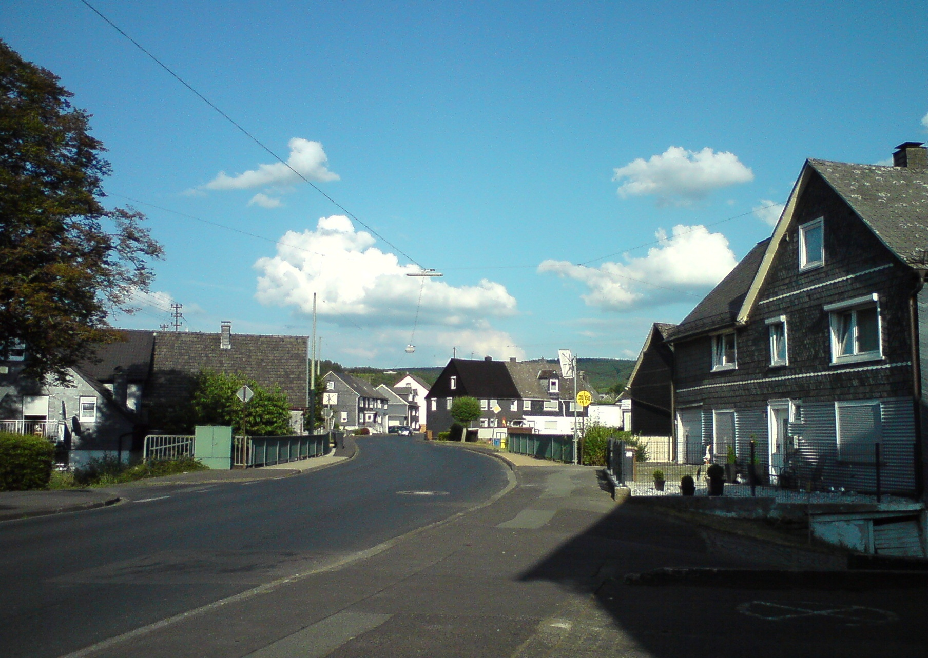 Die Zeppenfelder Ortsmitte, in Richtung Wiederstein.